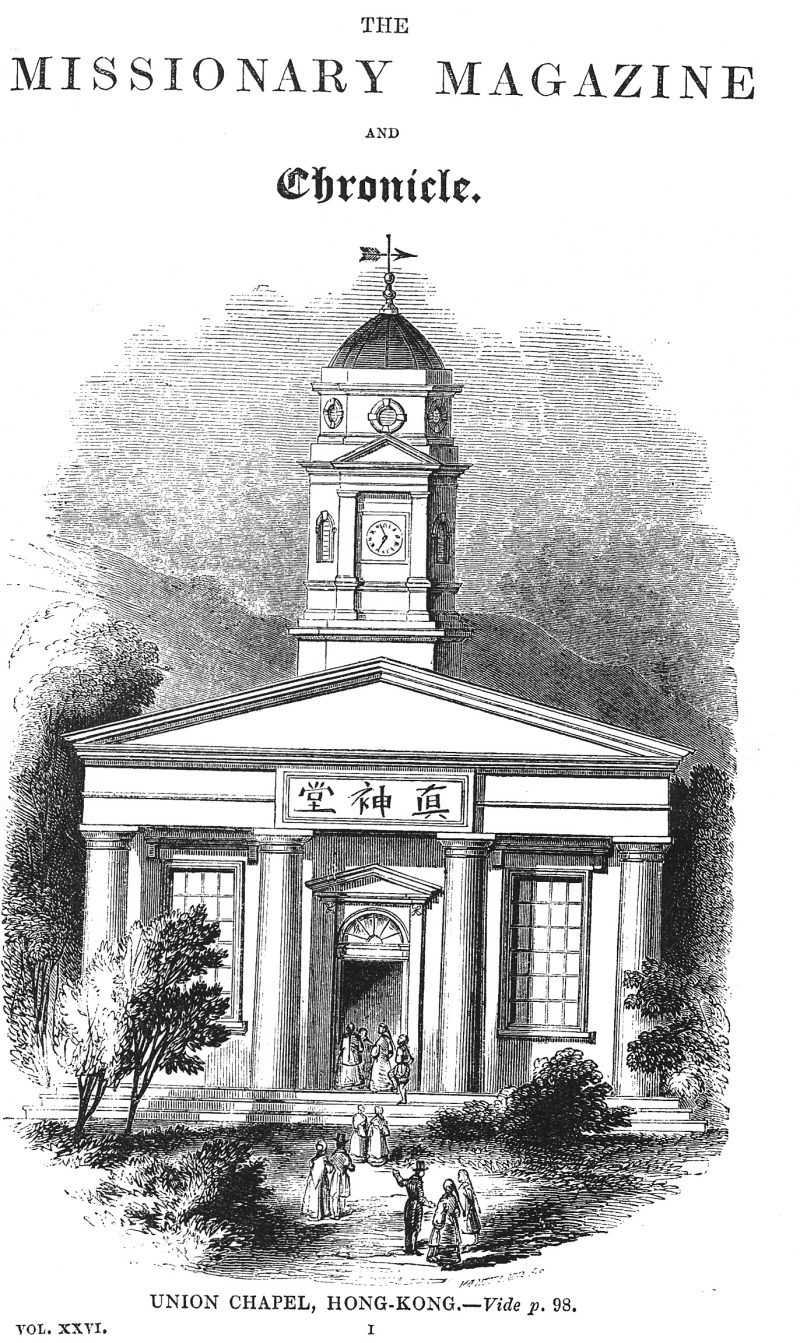 Обложка "Миссионерского журнала" с изображением Унионистской церкви в Гонконге